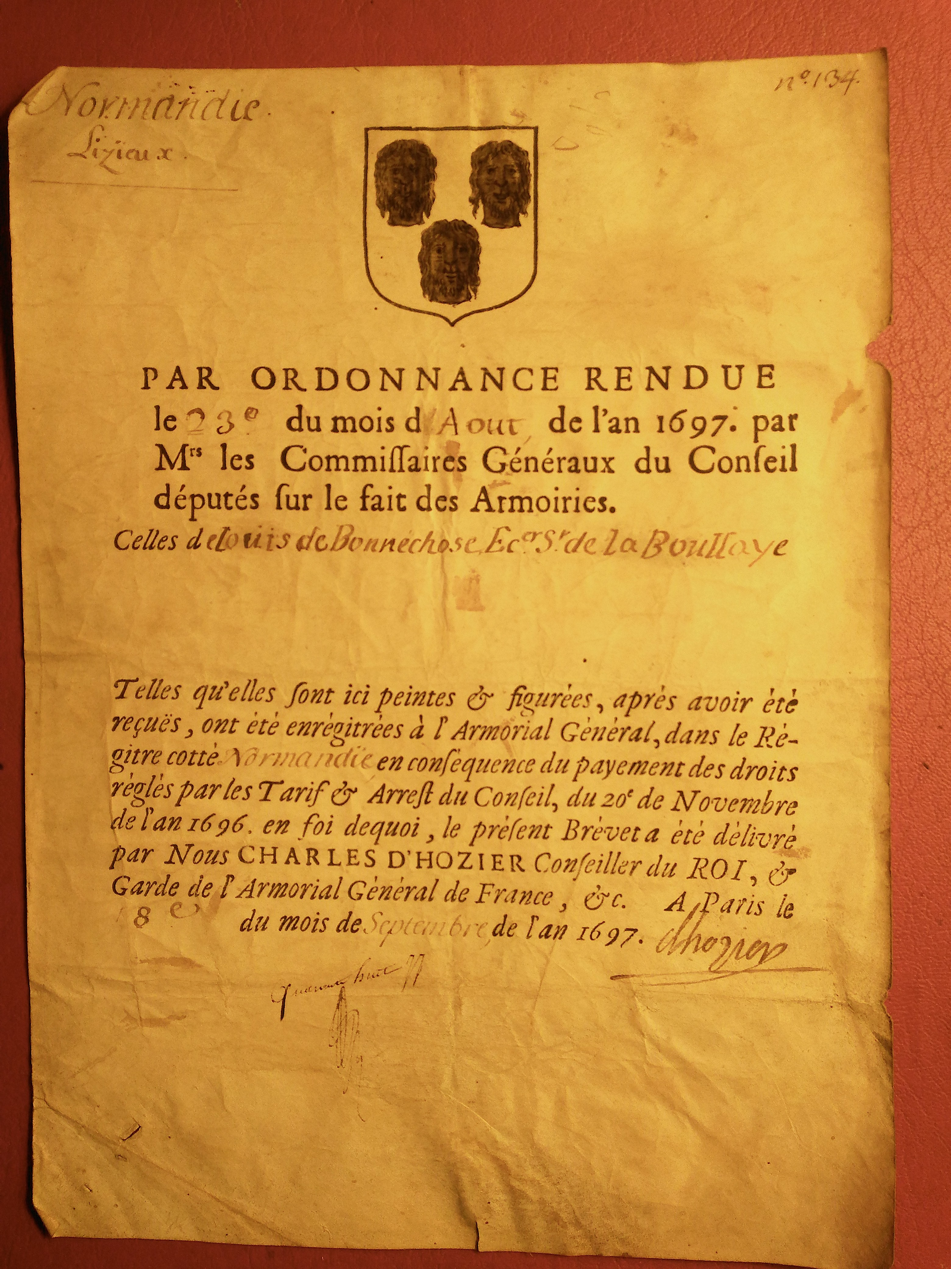 Attestation de dépôt des armoiries de la famille de Bonnechose auprès de l'Armorial Général de France le 8 septembre 1697 - Archives familiales